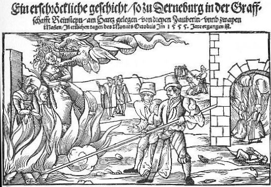 Hexenverbrennung in Derenburg (Grafschaft Reinstein) 1555 Scanner: Benutzer Geoz, Canon Pixma MP 110